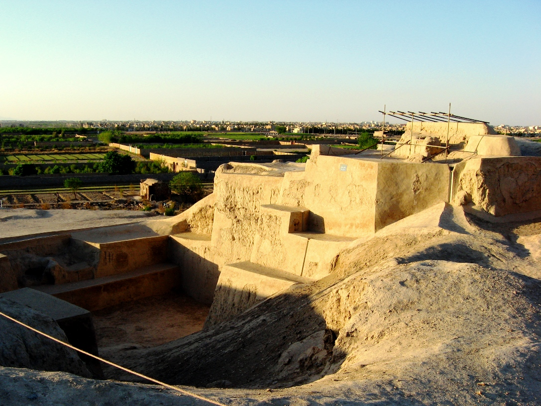 تپه سیلک کاشان